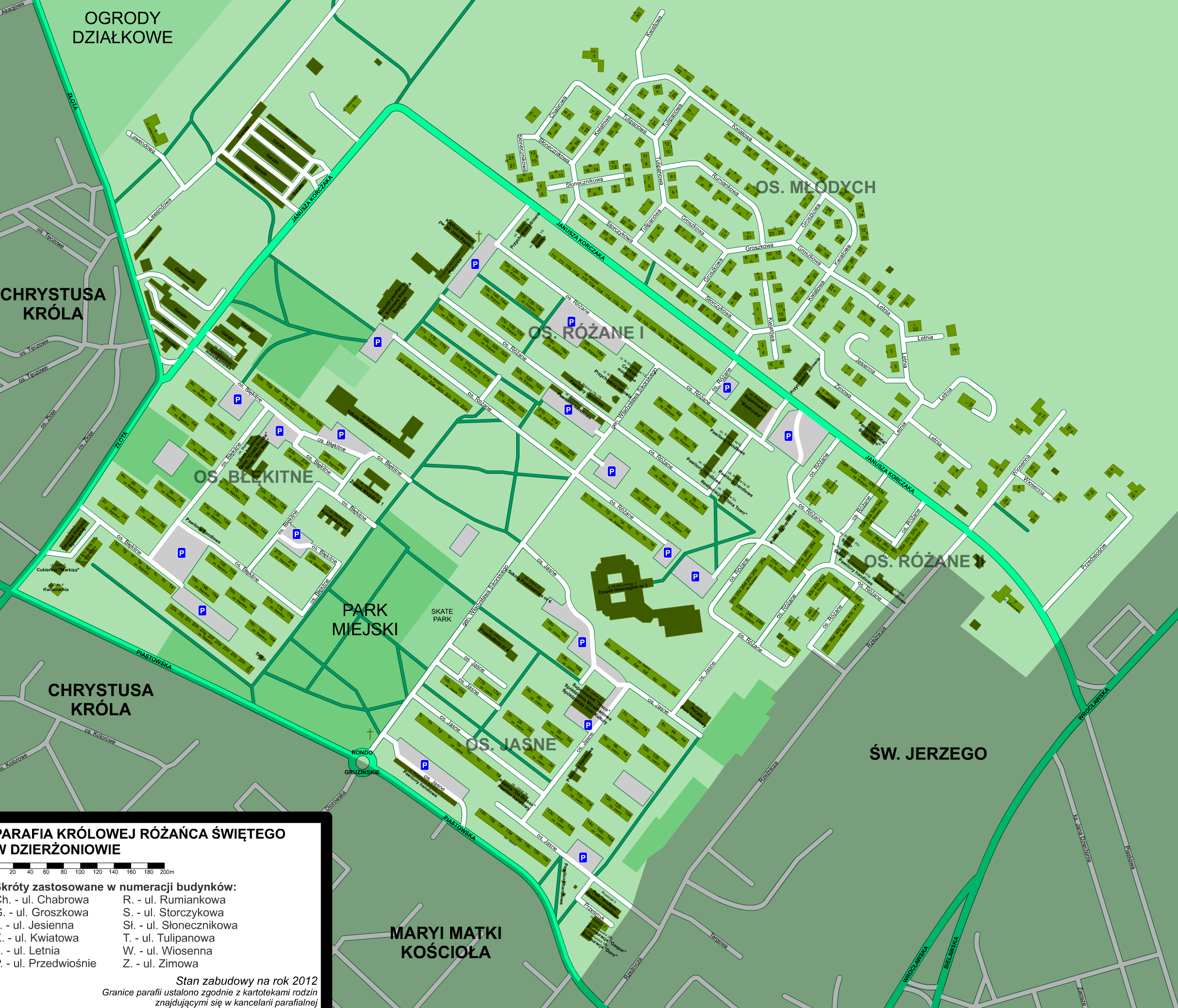 Mapa parafii pw. Królowej Różańca Świętego w Dzierżoniowie (os. Różane, os. Błękitne, os. Jasne i os. Młodych)